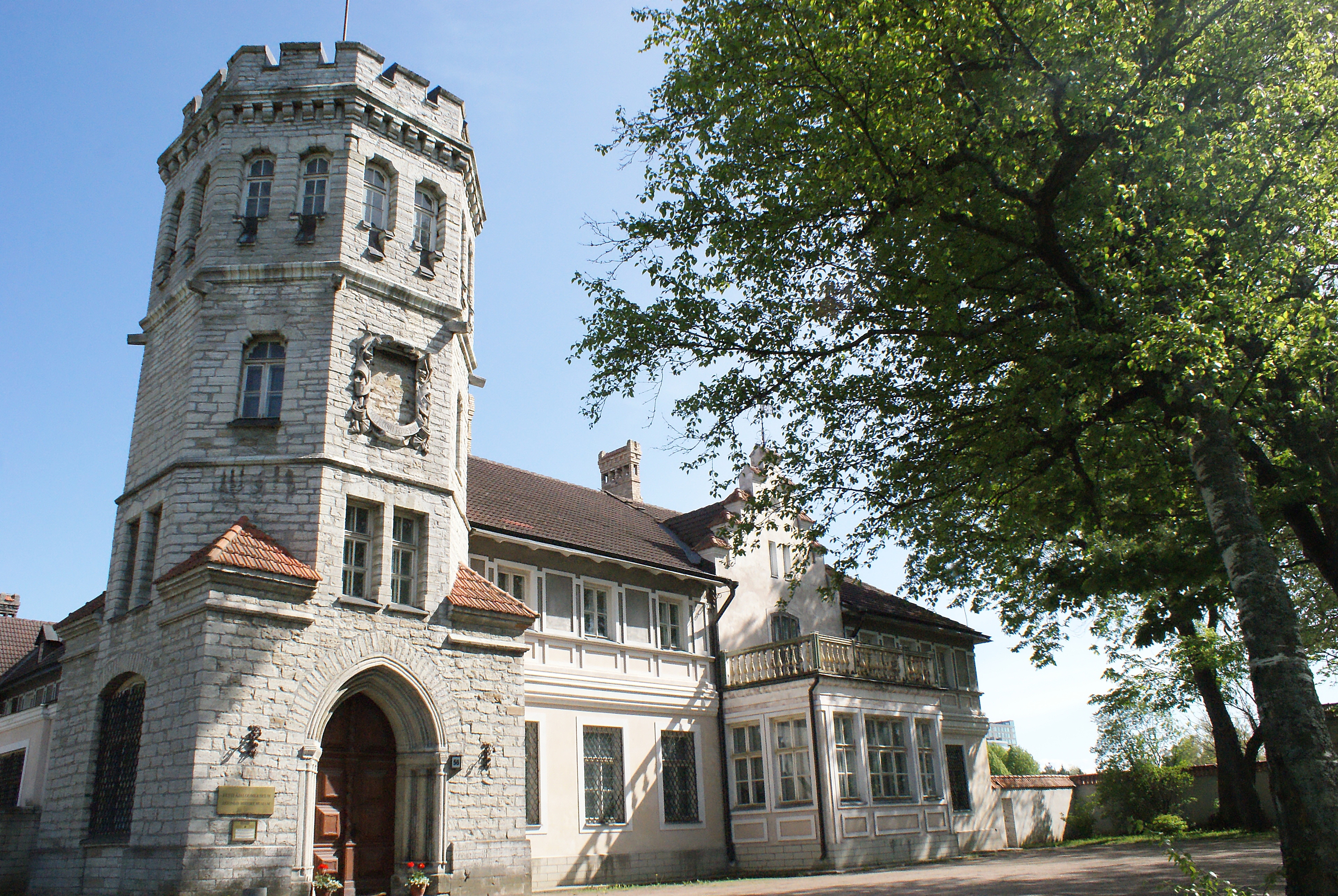 Maarjamäe suvemõisa loss